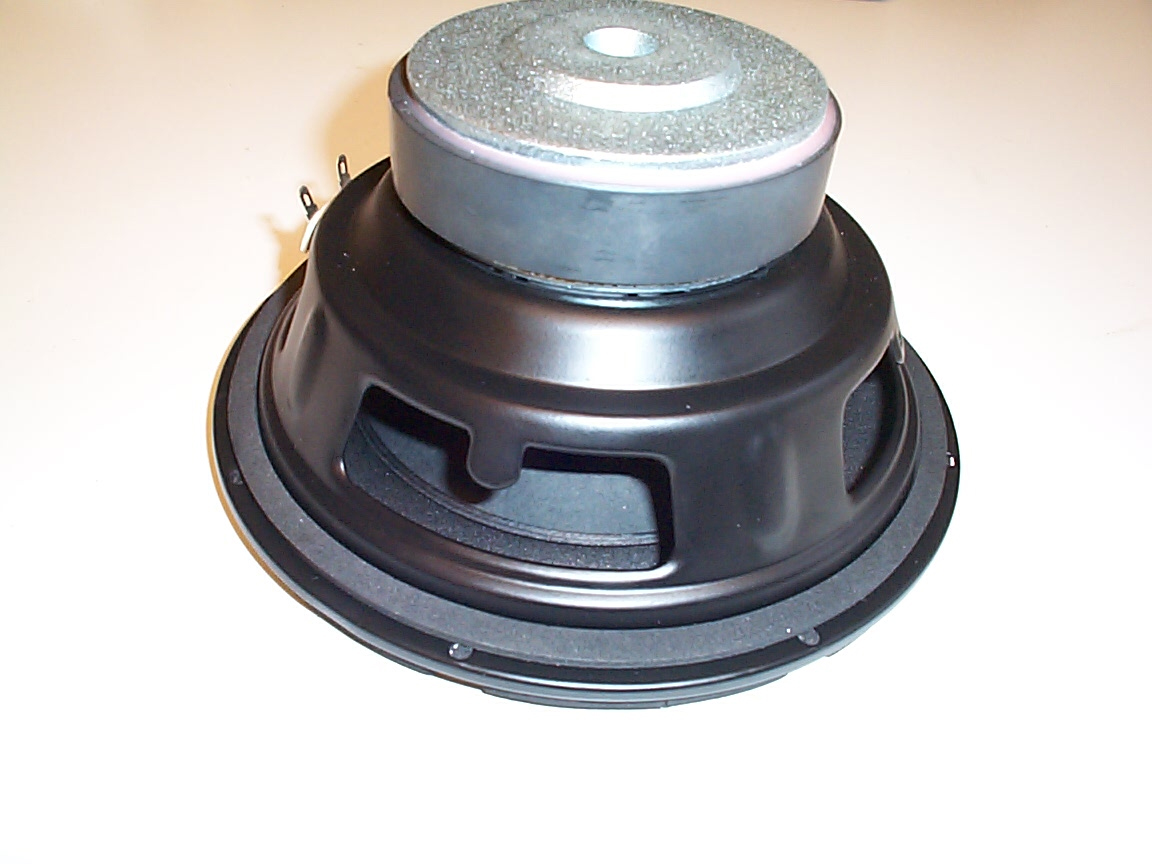 8" Loudspeaker